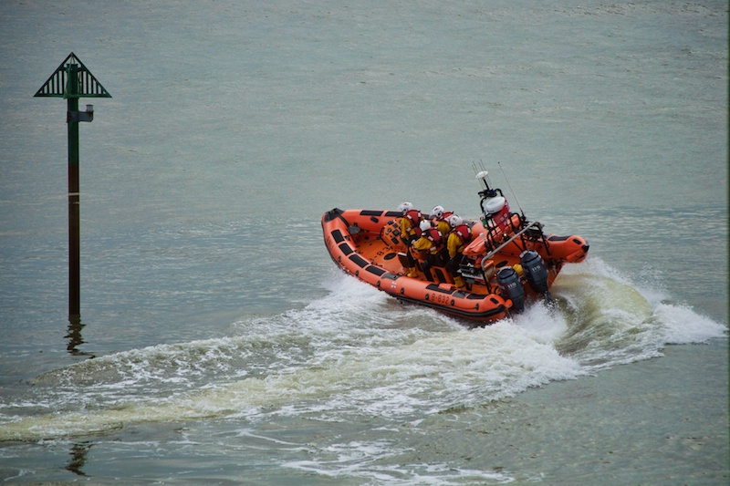 Porthcawl RNLI Lifeboat